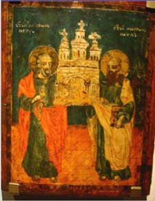 Св. Петар и Св. Павле, 1845 г. Изработена е од дрво и темпера. Куманово - црква Св. Никола